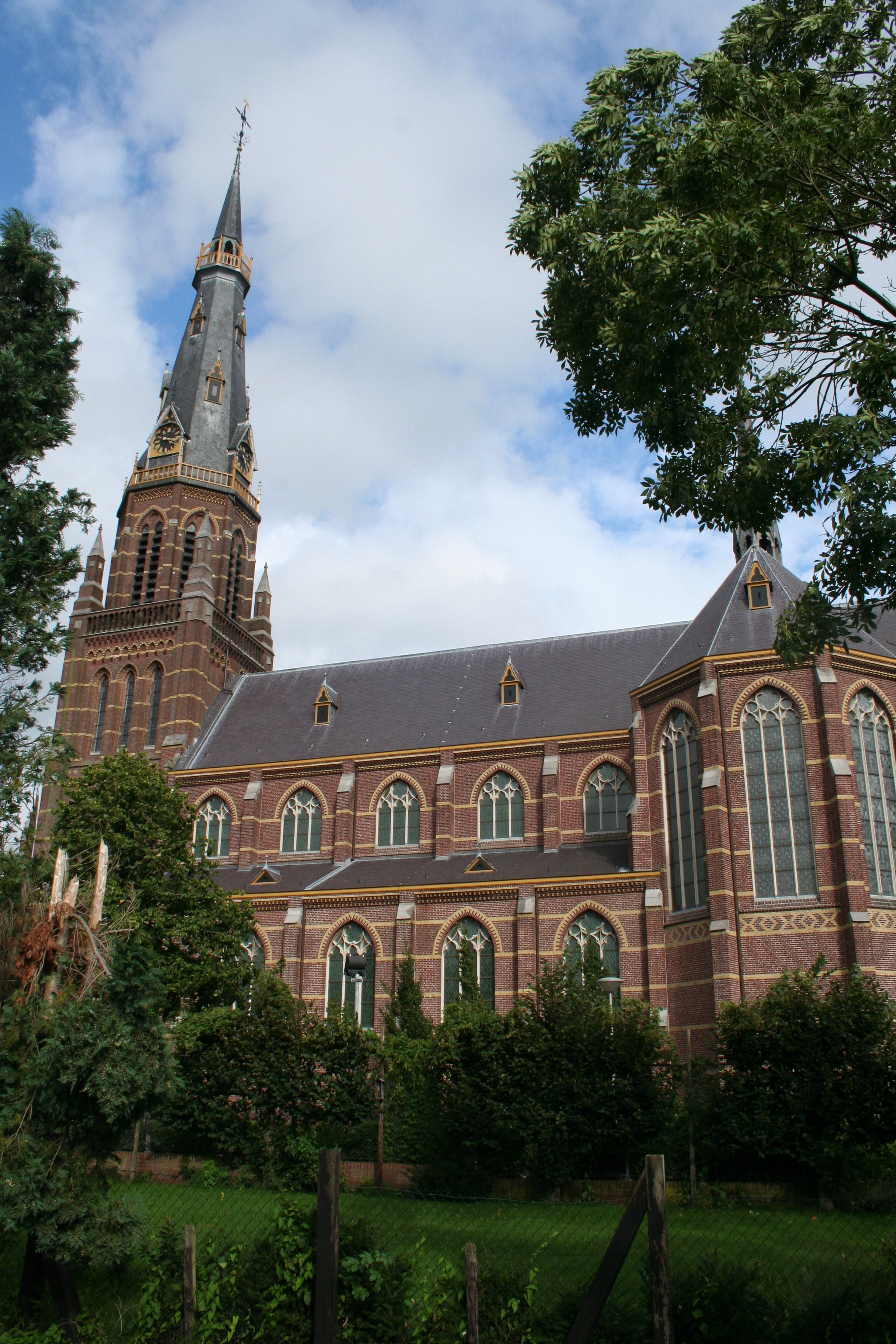 St. Clemenskerk Waalwijk The Netherlands